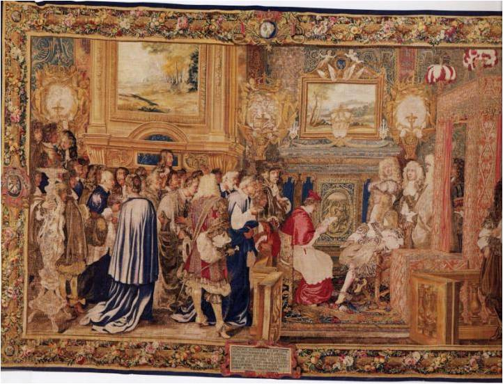 Llit